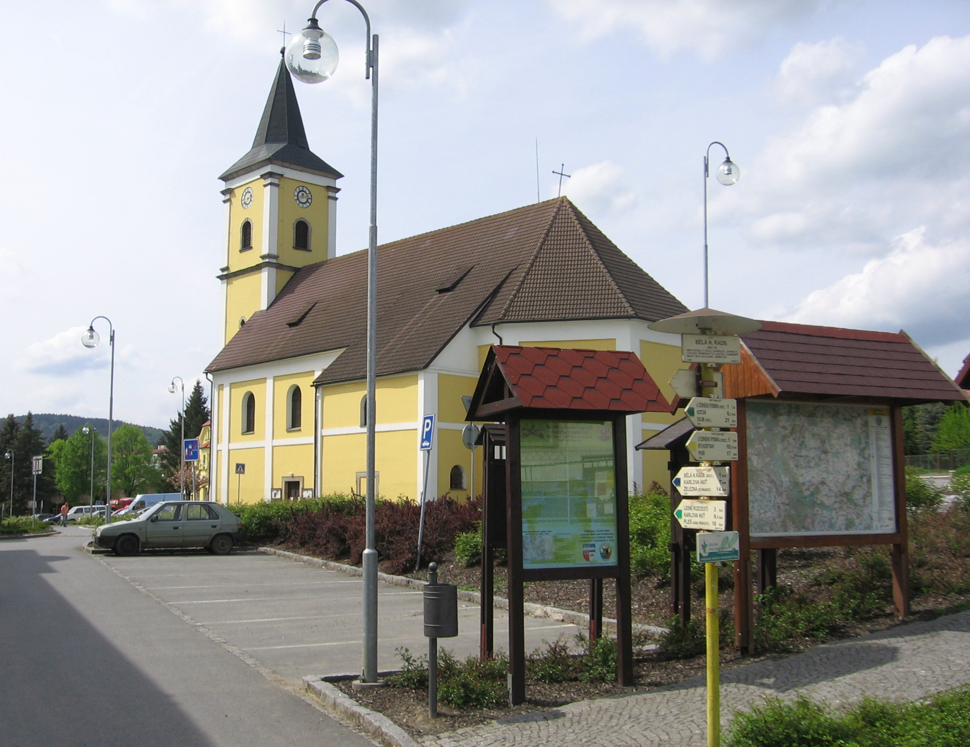 Kostel P. Marie Bolestné na náměstí, Bělá nad Radbuzou, okr.Domažlice